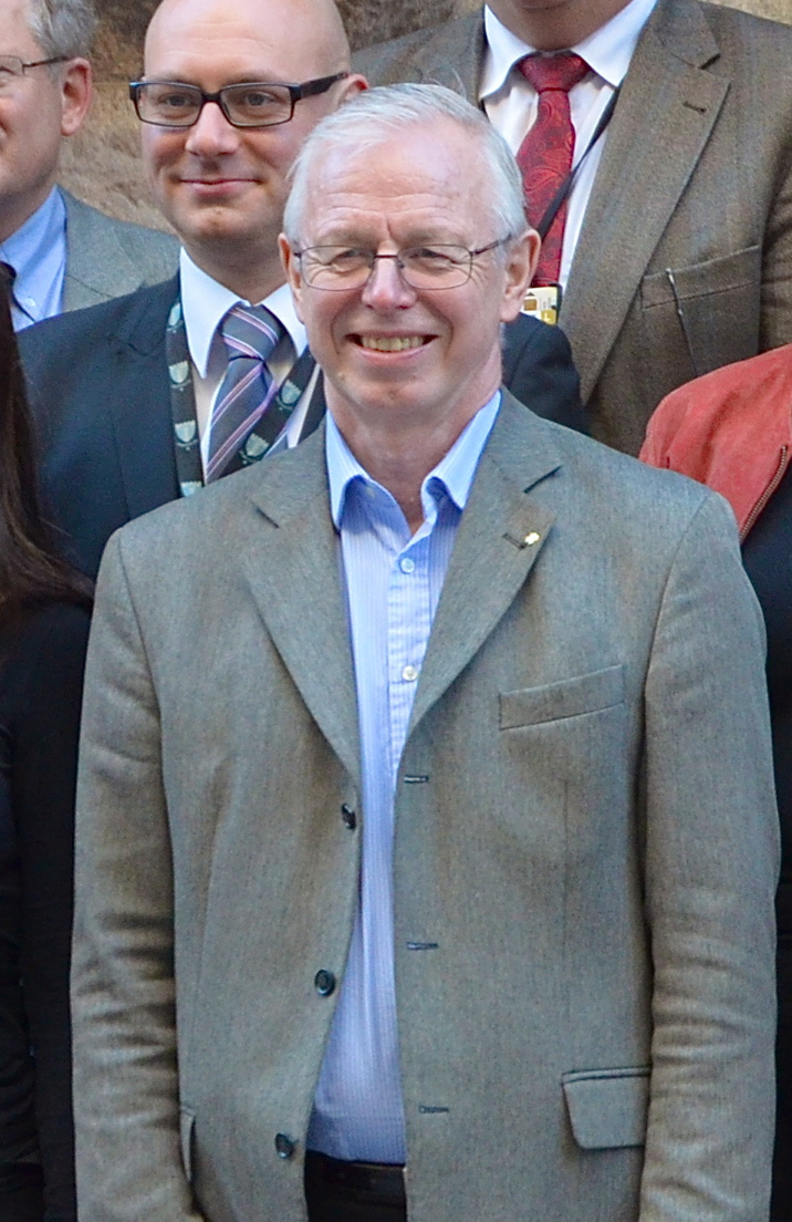 Några av Centerpartiets RD-ledamöter utanför Sveriges Riksdag 13 mars 2012.